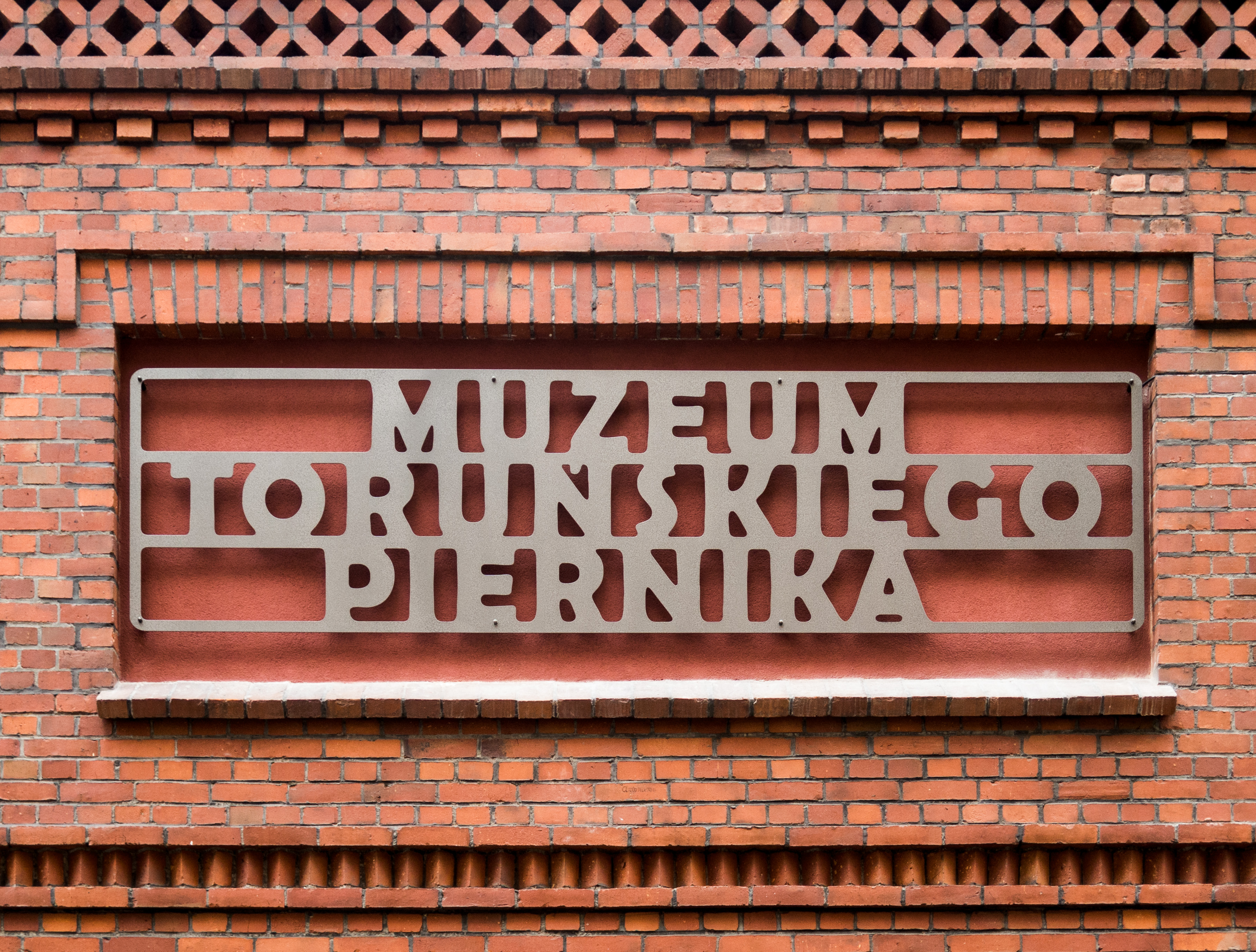 Szyld Muzeum Toruńskiego Piernika.